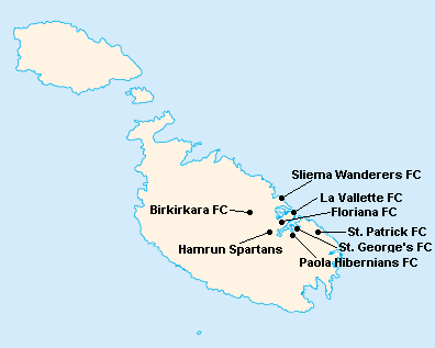 Répartition des clubs en First Division Maltaise 1961-1962.